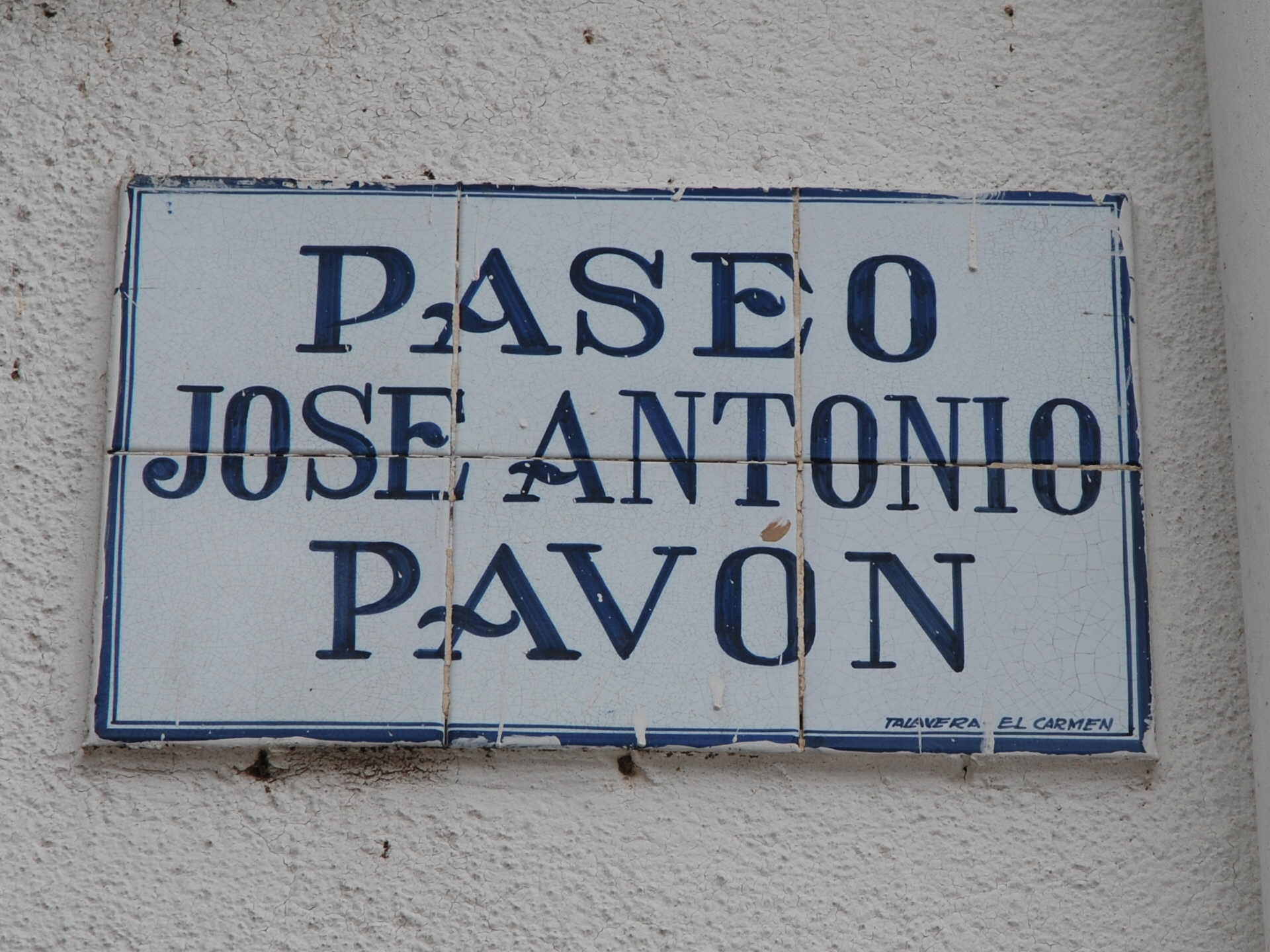 Paseo Pavón (Casatejada, Cáceres)